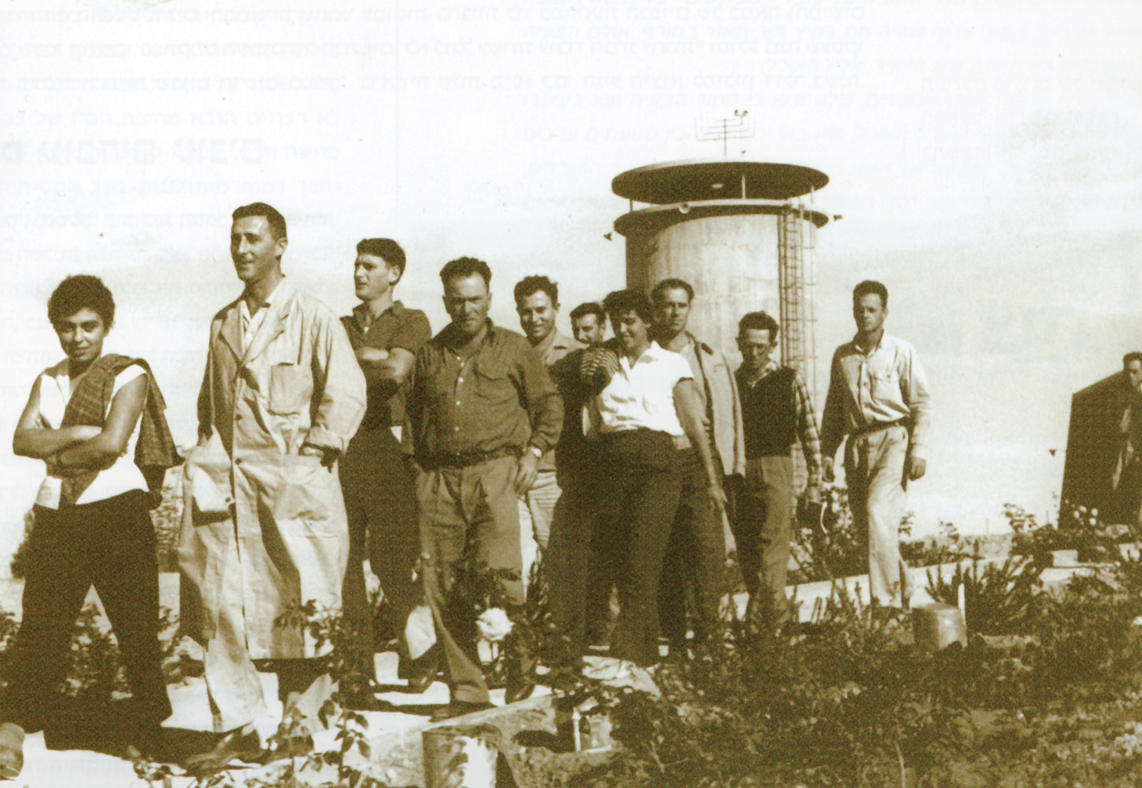 מייסדי מכתשים